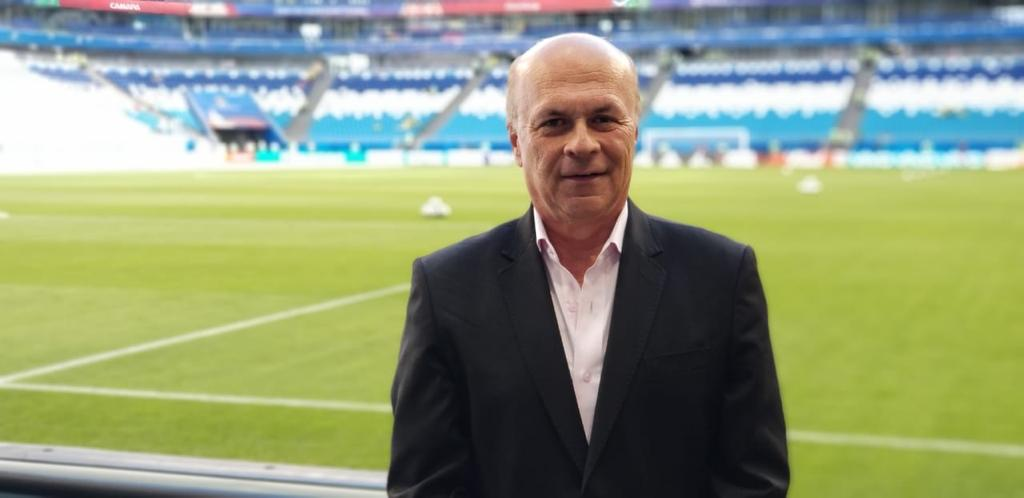 Copa Mundo Rusia 2018